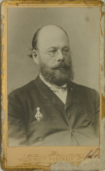 Янжул, Иван Иванович